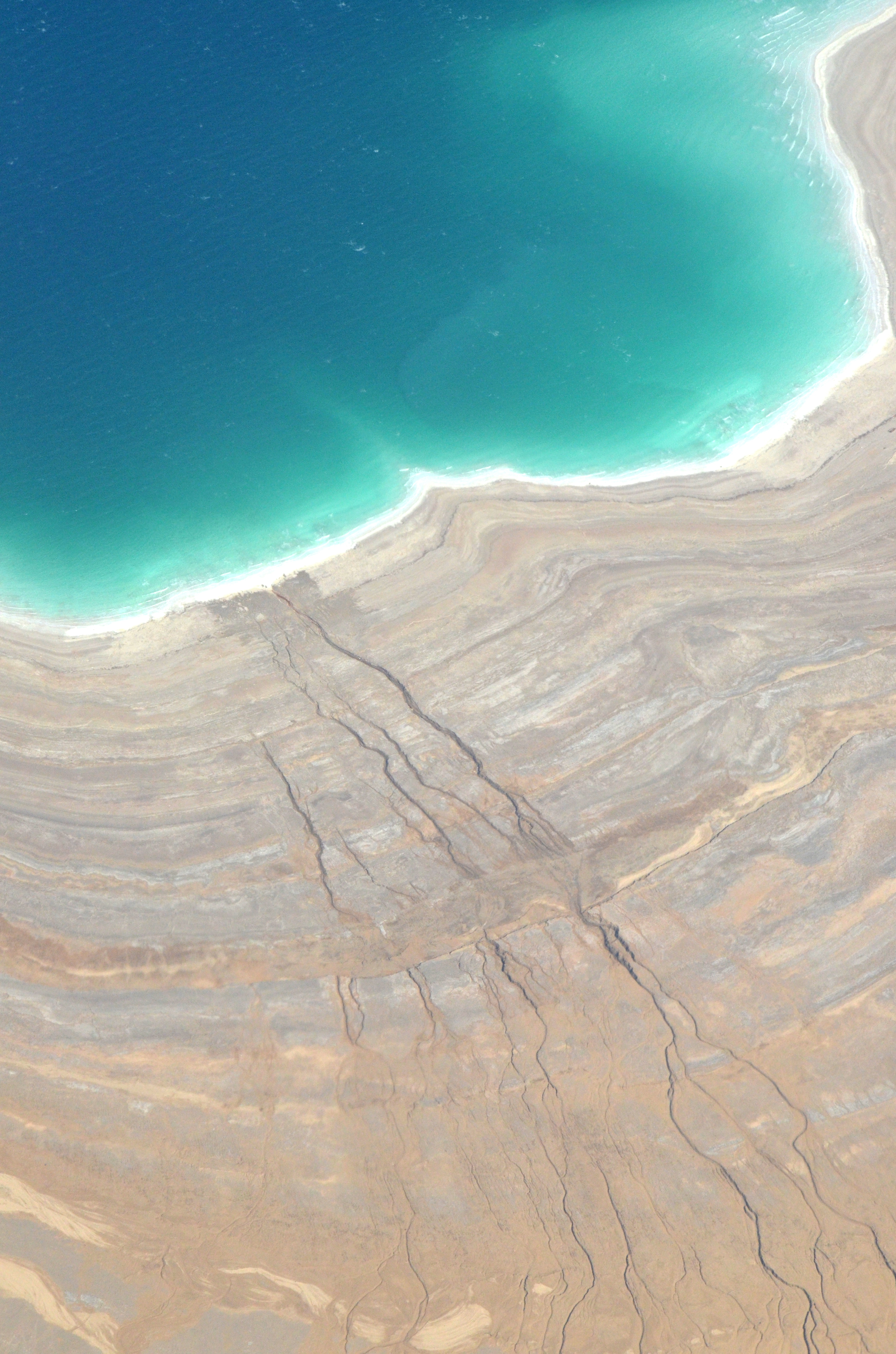 חוף ים המלח